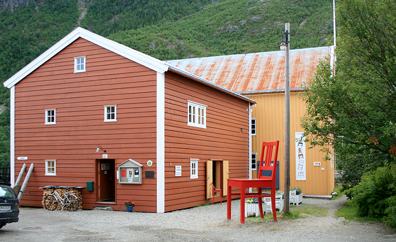 Vefsn museum, Mosjøen, Norway.